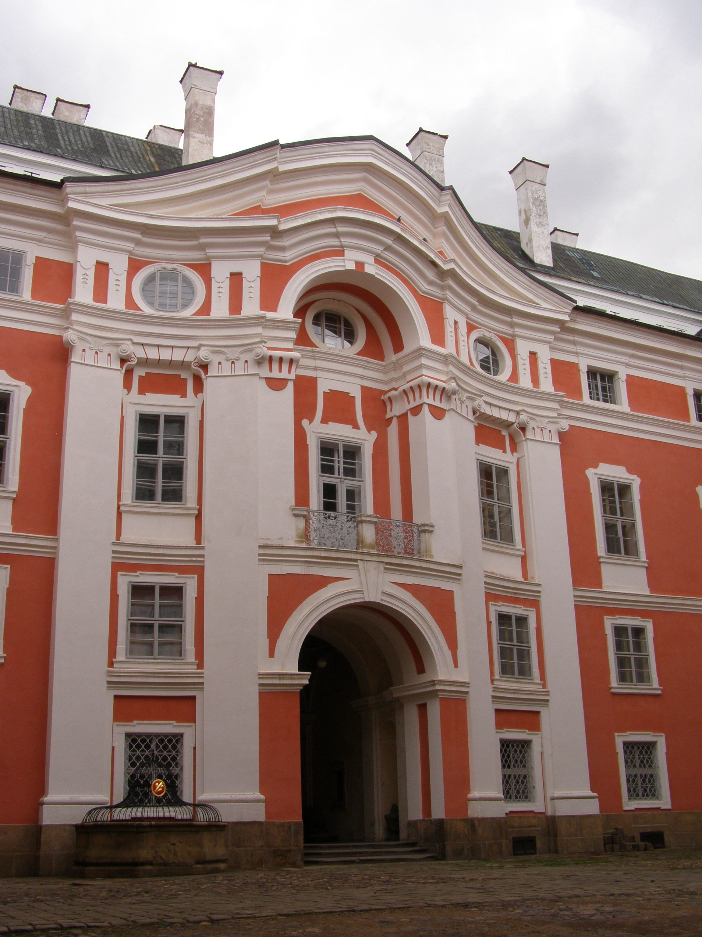 Broumov, vnitřní dvůr benediktinského kláštera